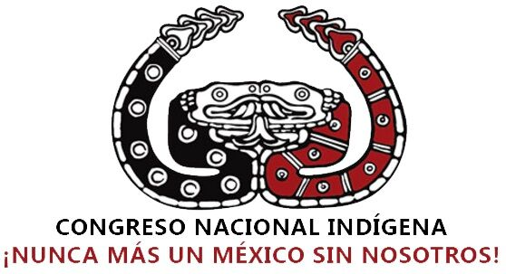 Logo del Congreso Nacional Indígena, muestra dos serpientes encontrándose en el centro y la consigna: Nunca más un México sin Nosotros!